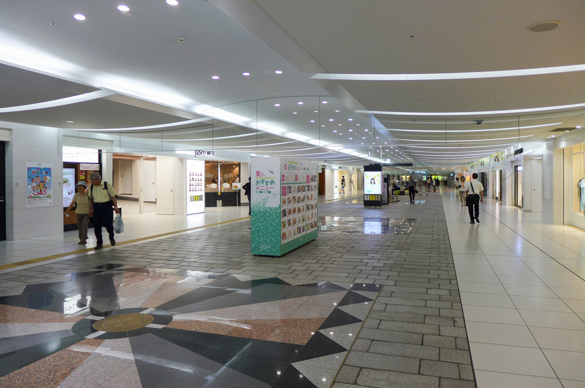 Paseo (Sapporo)